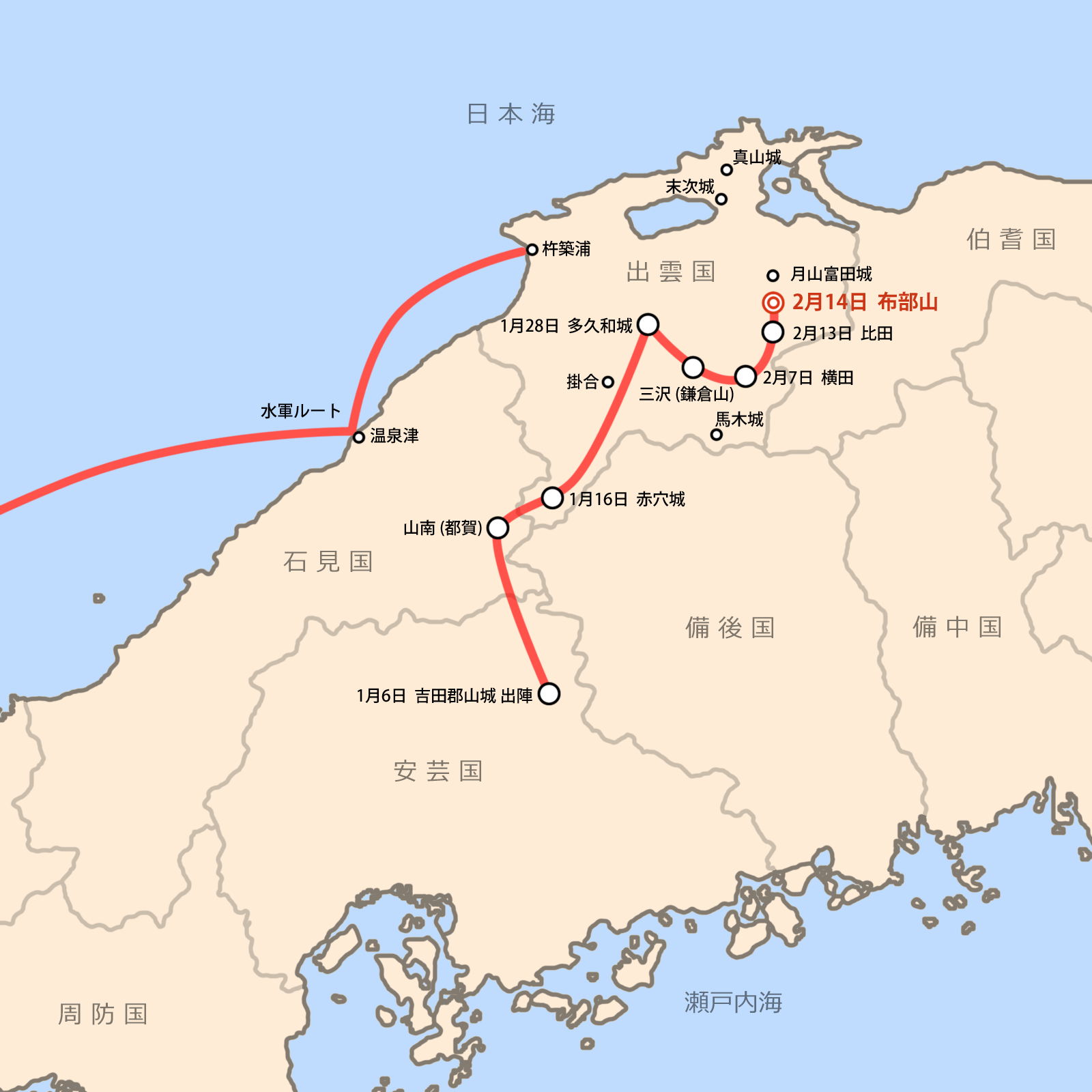 布部山の戦いまでの毛利軍の侵攻ルート